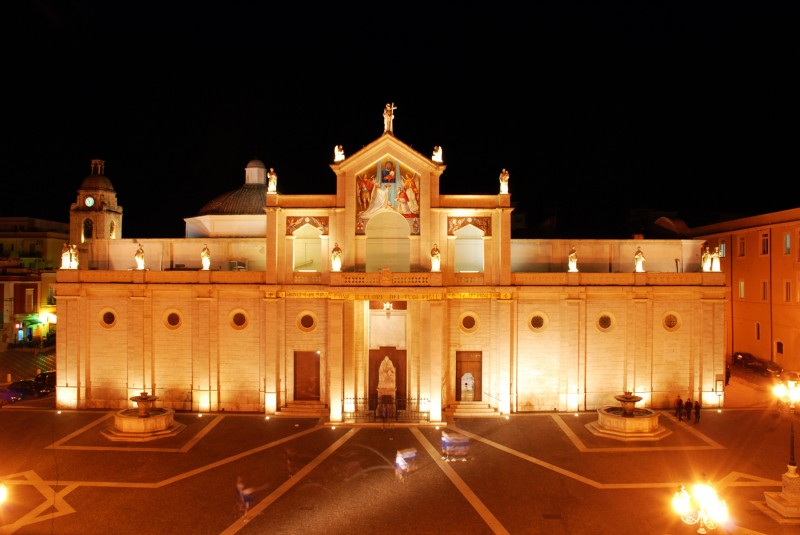 Cattedrale di Manfredonia in notturna